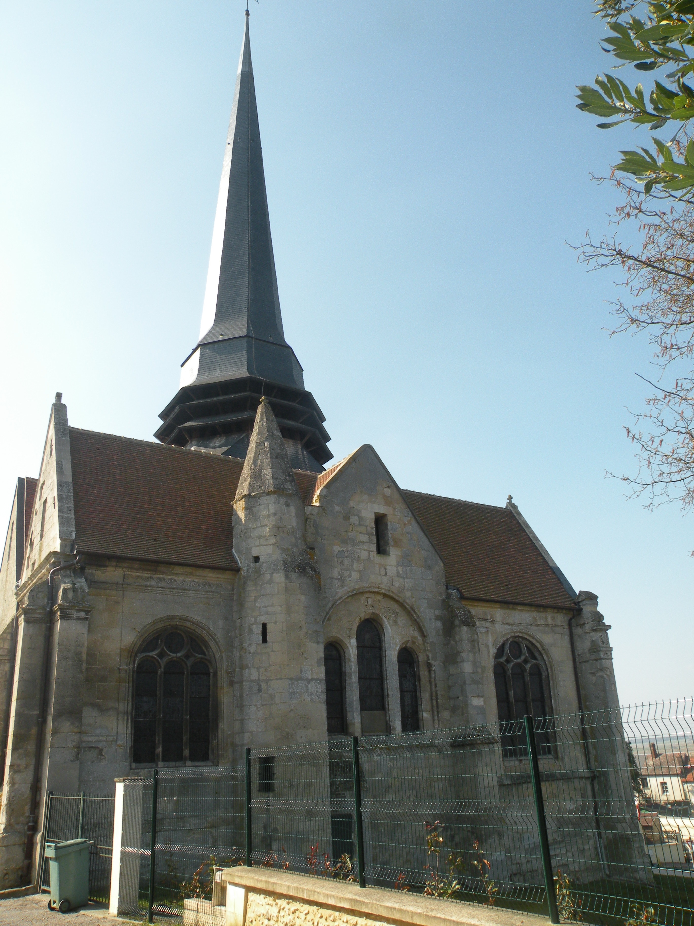 extérieur de l'église st Martin d'Amblainville